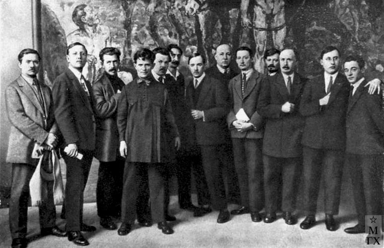 Групповая фотография, сделанная на выставке "V лет РККА" или "Х лет РККА". Сл.напр.: С. М. Спирин, И.Г. Дроздов, М.Б. Греков, И.Ф.Колесников, Г.Н. Горелов, В.А. Зверев, В.Н. Яковлев, Е.М.Чепцов, М.И.Авилов, В.А.Кузнецов, И.А. Владимиров, Н.И. Дормидонтов, С.А. Павлов.